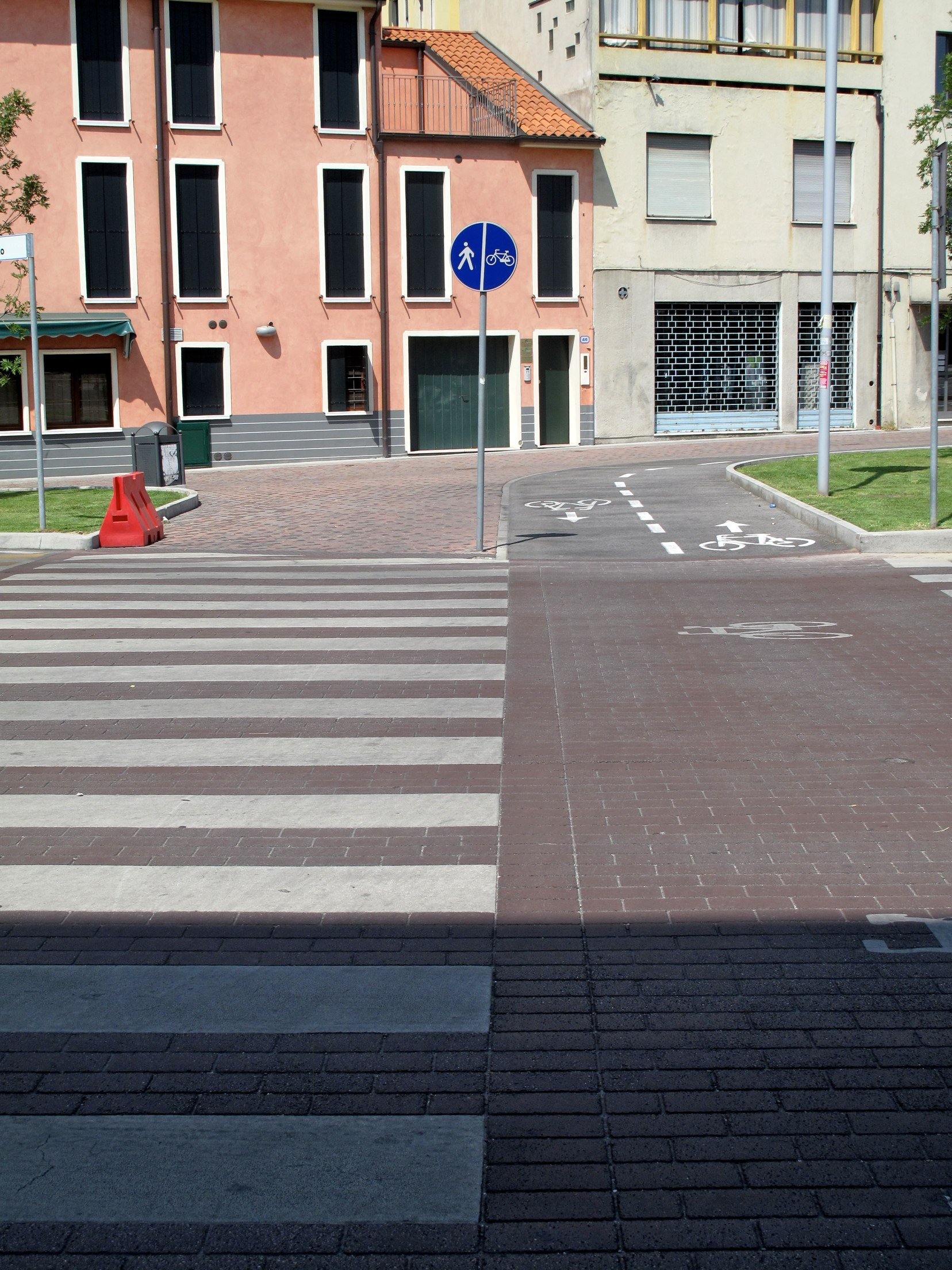 Padova juil 09 186